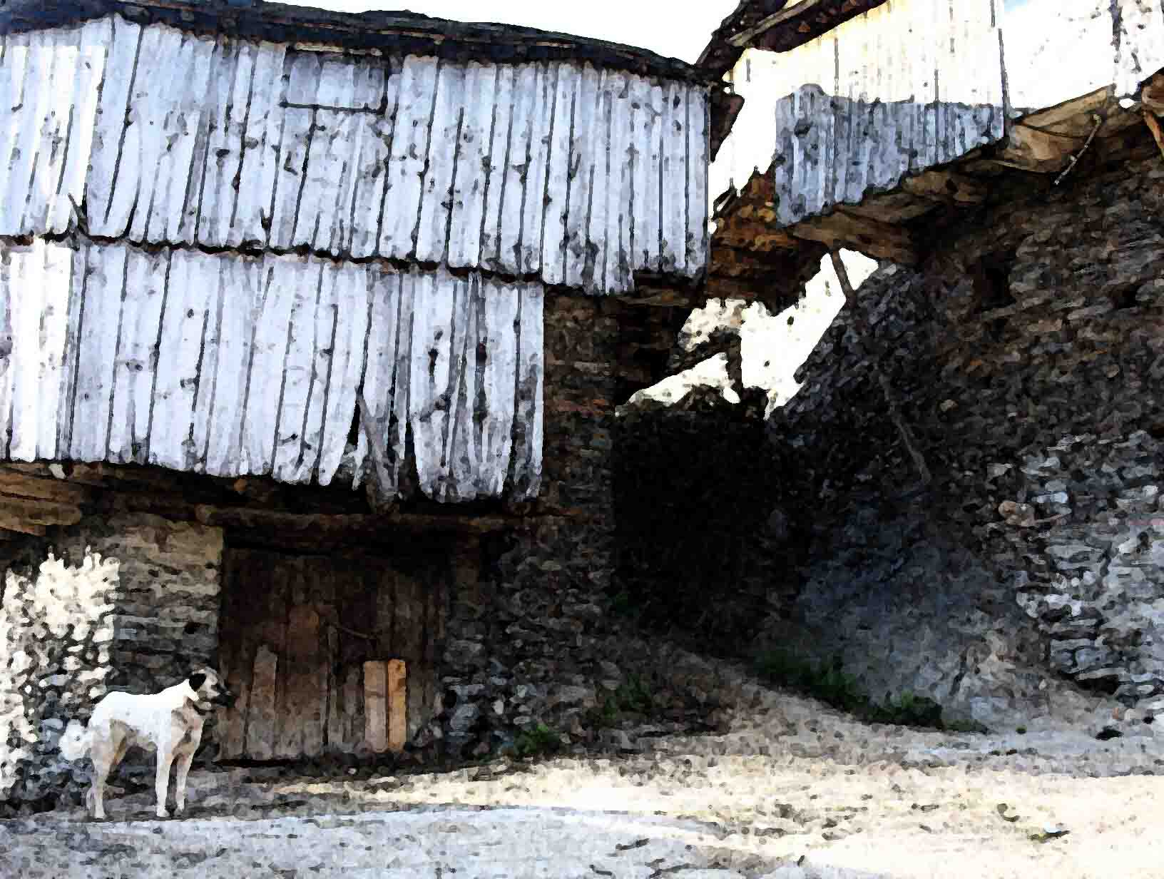 Arquitectura de Forna